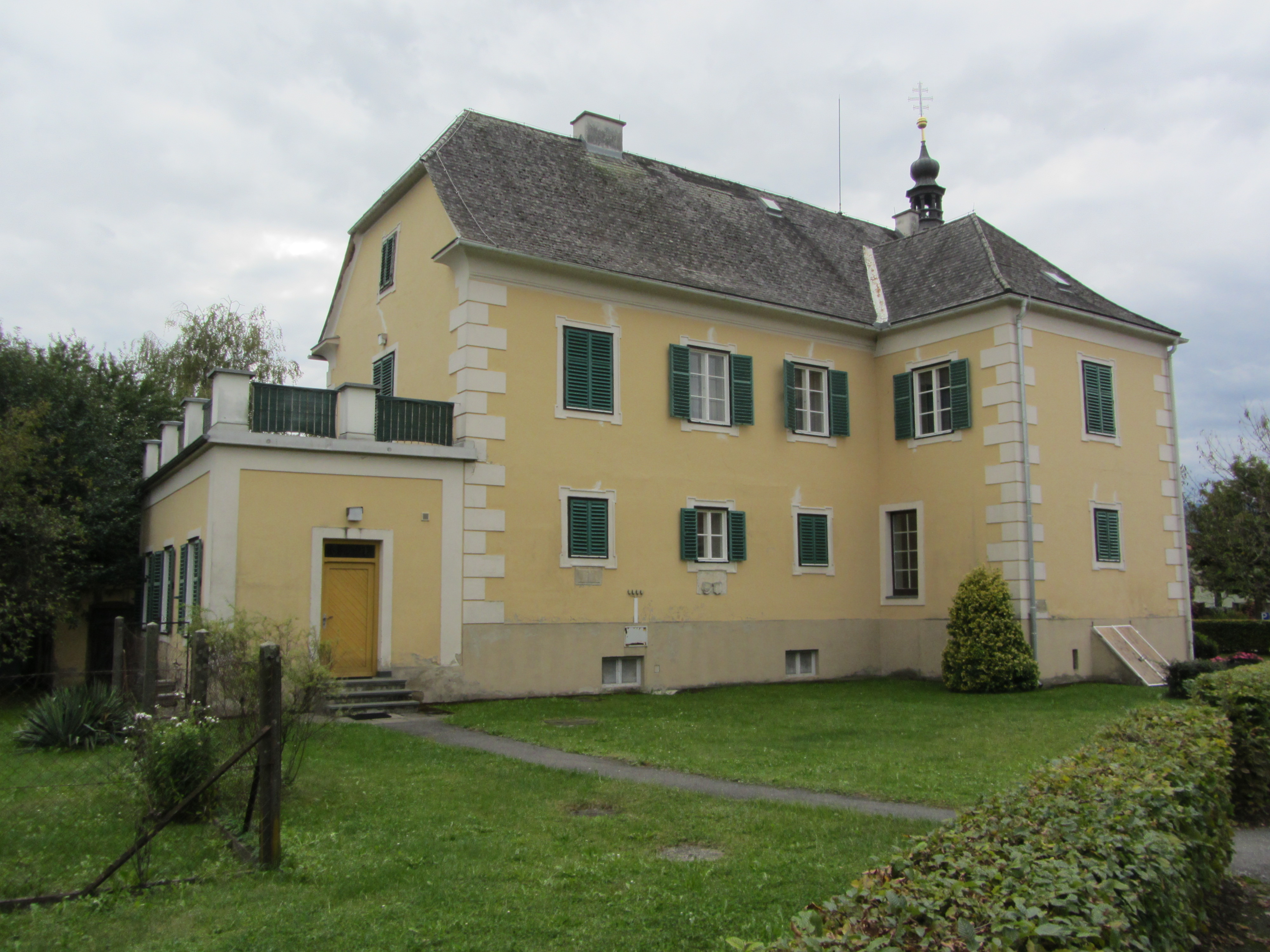 Pfarrhof